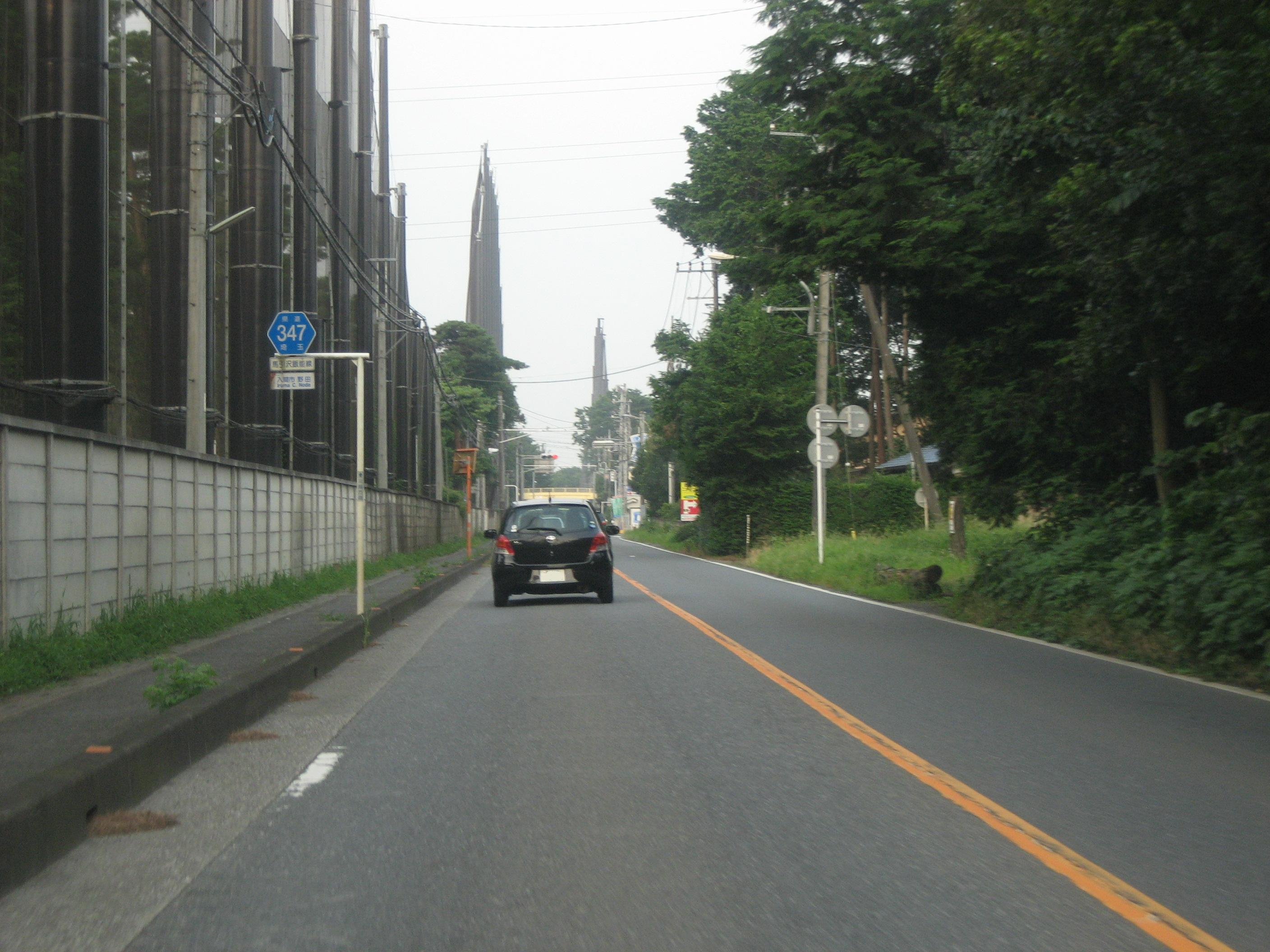 埼玉県道347号線入間市内